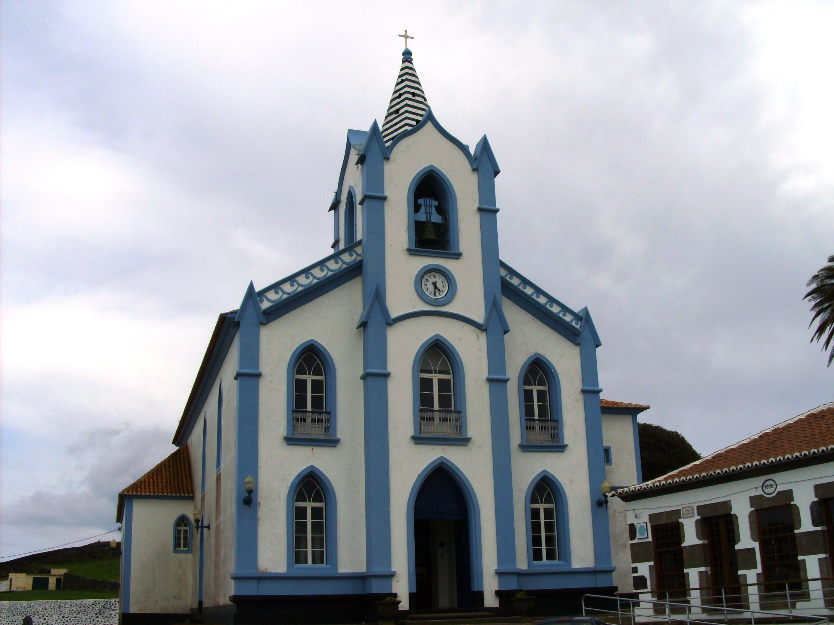 Igreja de São Roque dos Altares, Altares, Angra do Heroísmo, Ilha Terceira, Açores.